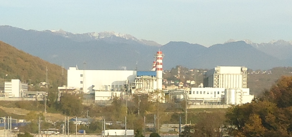 Адлерская теплоэлектростанция